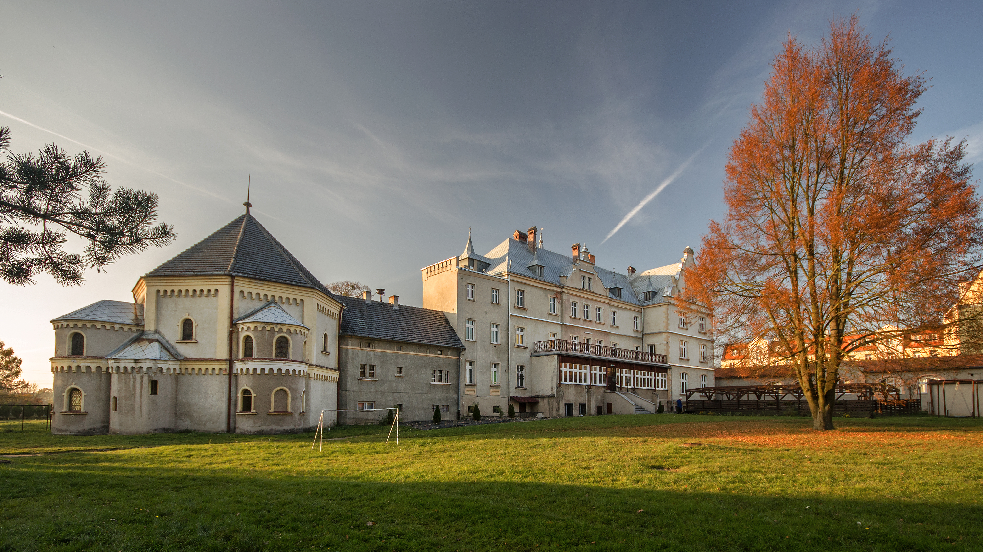 Ostrowina, pałac, 1902